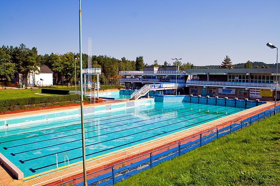 Drzonków-basen